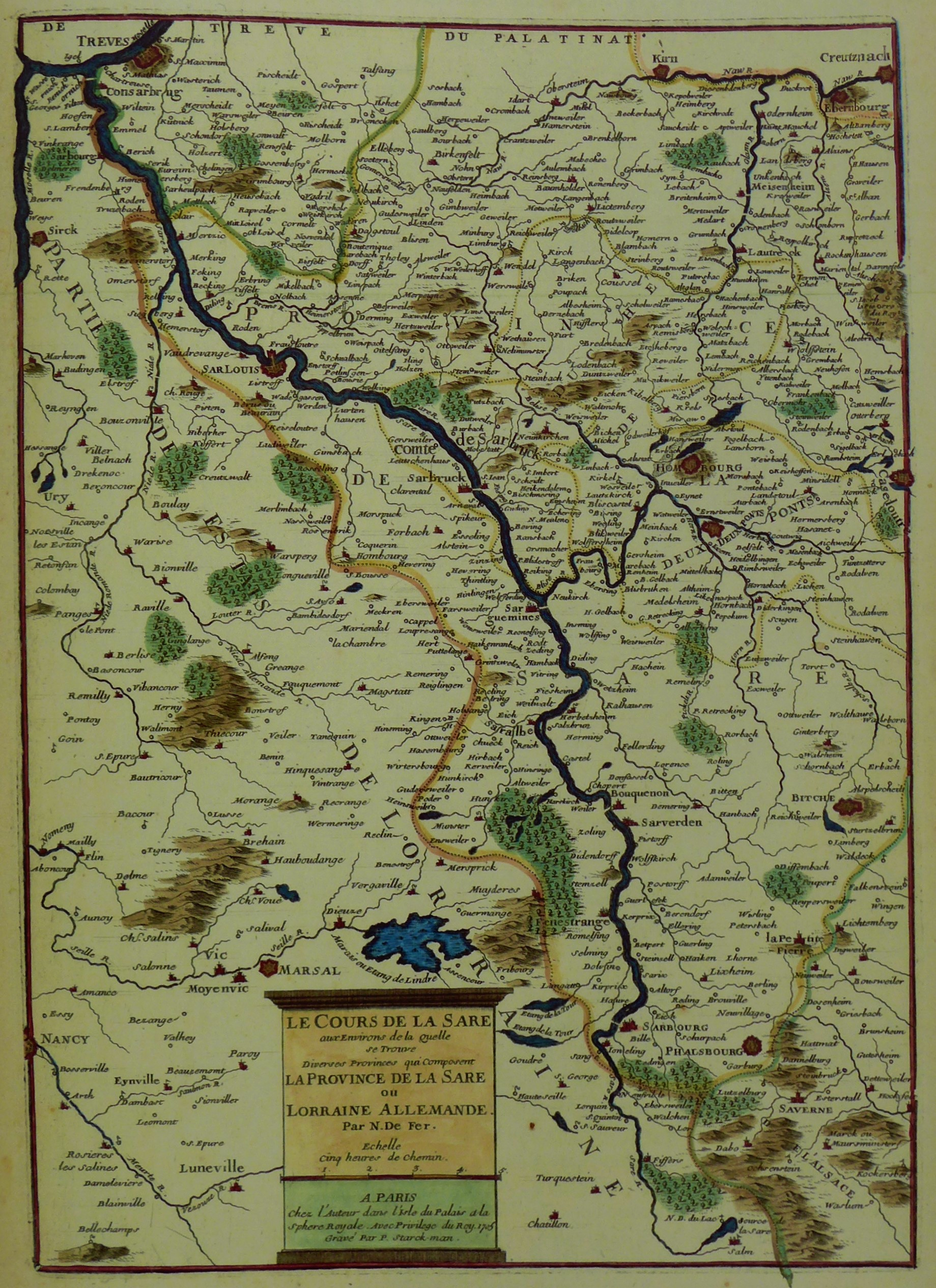 Nicolas de Fer (Hrsg. und Verleger), P. Starck (Stecher): Le Cours de la Sare aux Environs de la quelle se Trouve Diverse Provinces qui Composent la Provine de la Sare ou Lorraine Allemande (sic!), ca. 1: 380.000, 23,8 cm x 33,7 cm, Stadtarchiv Saarlouis